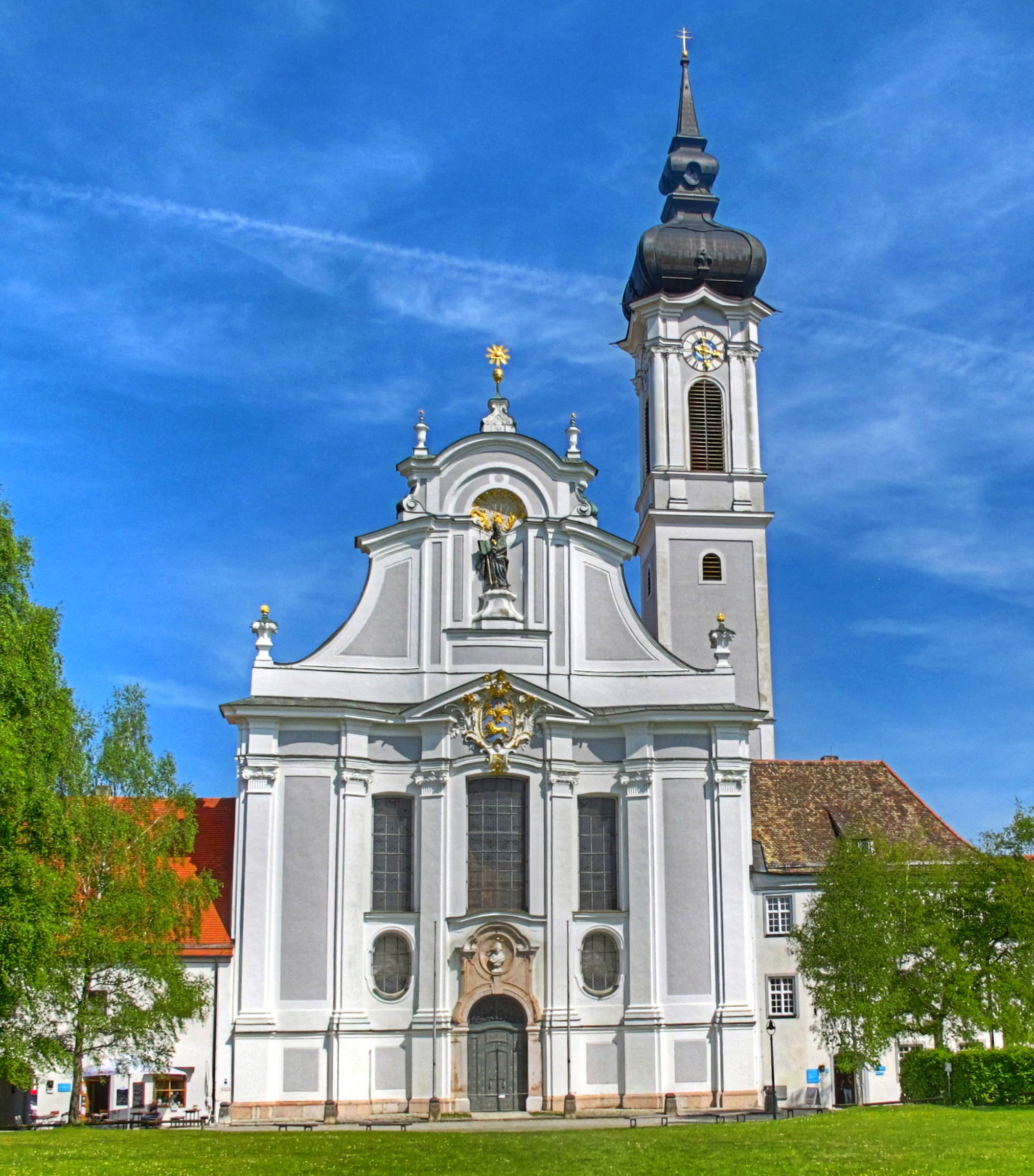 Deutschland, Bayern, Landkreis Landsberg am Lech, Dießen, Marienmünster, Vorderansicht